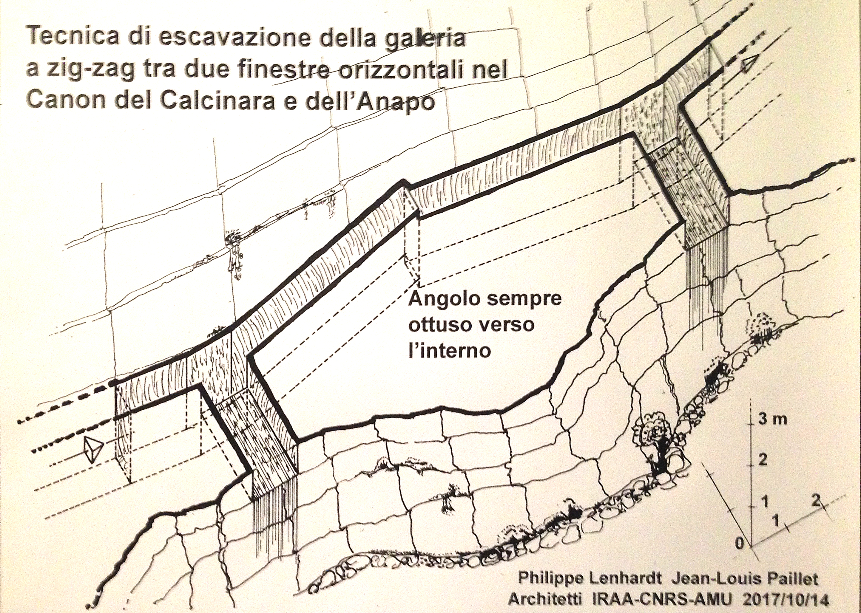 Andamento a zig zag con finestre orizzontali